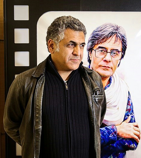 مانی حقیقی - ۱۳۹۴